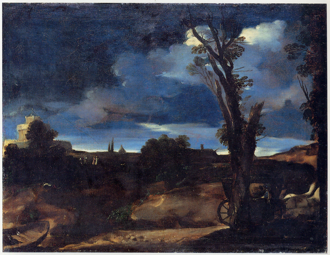 Paesaggio al chiaro d luna, 55x71 cm, Nationalmuseum Stockolm